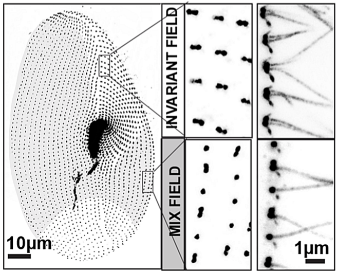 Fig. 1. Localización de proteínas TZ en Paramecium (A) Paramecia marcada por la tubulina monoclonal anti-glutamilada ID5 (tiñendo cuerpos basales (BB) y cilios). La corteza de Paramecium presenta diferentes regiones en las que el patrón de los BB difiere. Los BB se organizan en dobletes en la región de "campo invariante" en gris. El campo mixto, resaltado aquí en gris claro, presenta singletes y dobletes BB intercalados. La región posterior, en blanco, solo posee BB sinples. A' es una ampliación de la vista de la superficie. A es una sección transversal que muestra que en el campo invariante cada BB del doblete está ciliado, mientras que en el campo mixto solo el BB posterior tiene un cilio. Barras = 10 μm y 1 μm.